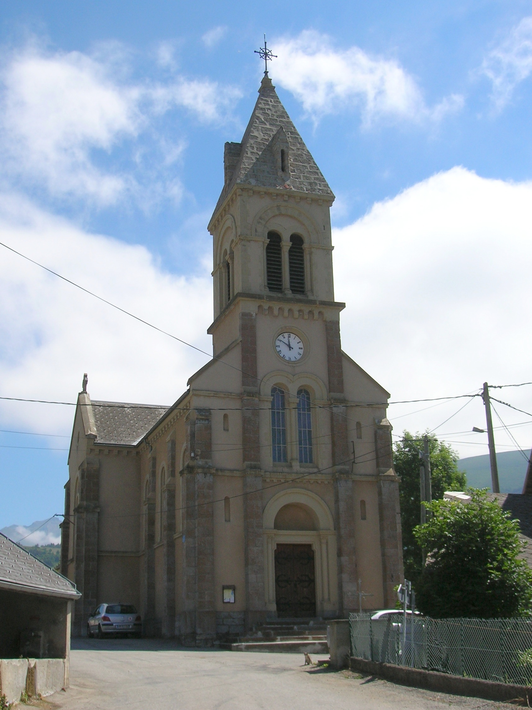 L'église de Saint-Michel-en-Beaumont, Isère, AuRA, France.